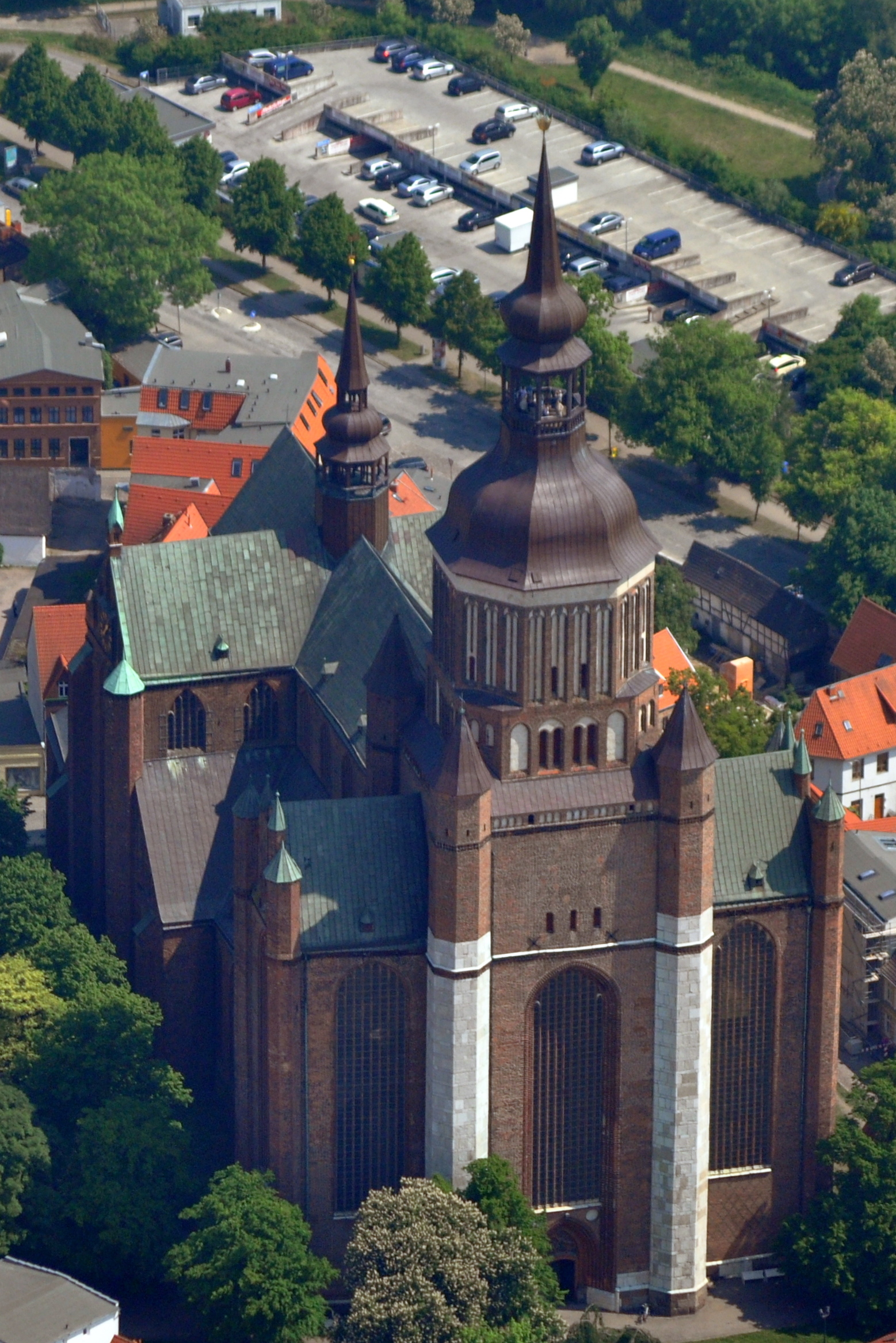 Die Bilder wurden von mir während eines einstündigen Rundflugs ab Flugplatz Güttin am 21. Mai 2011 aufgenommen. Die Bildbeschreibung steht im Dateinamen. Aufgenommen mit einer Nikon D5000 durch das Seitenfenster des Flugzeugs.